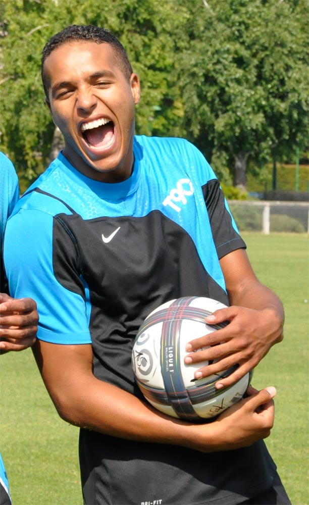 Youssef El Arabi à l'entrainement